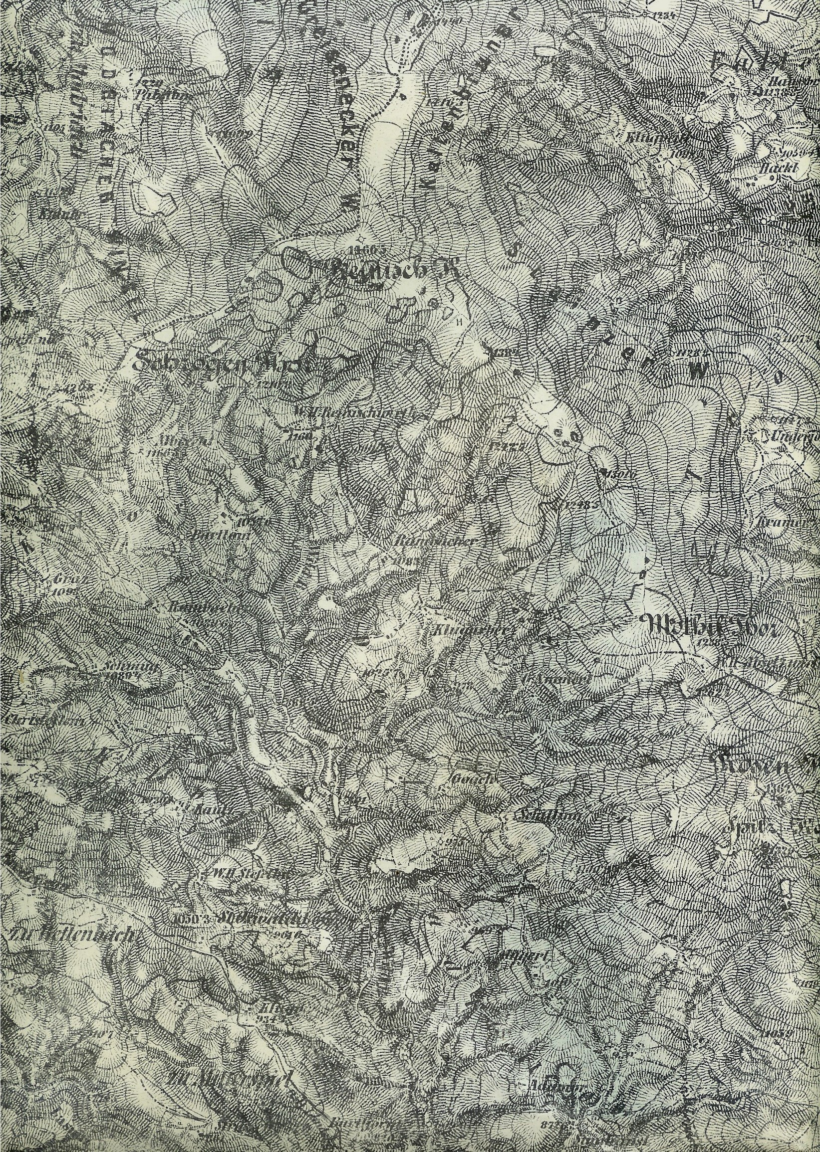 Klosterwinkel Ende des 19. Jahrhunderts. Messtischblatt der francisco-josephinischen Landesaufnahme